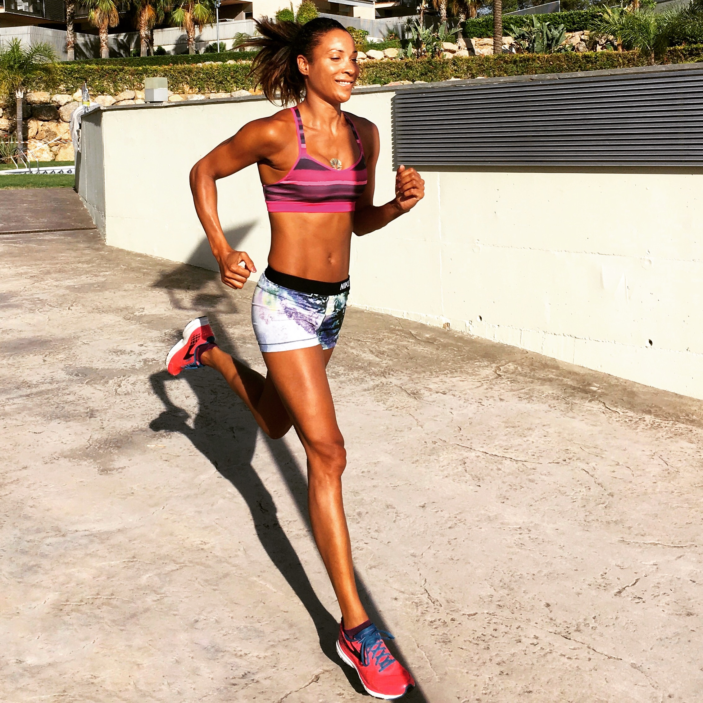 In Spanien beim Training